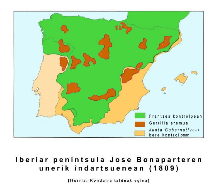 Iberiar penintsula Jose Bonaparteren unerik indartsuenean (1809), UEUren kondaira.eus webgunetik hartua.